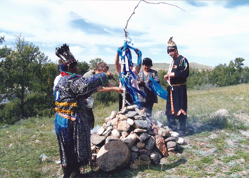 Санг - шаманский обряд освящения места